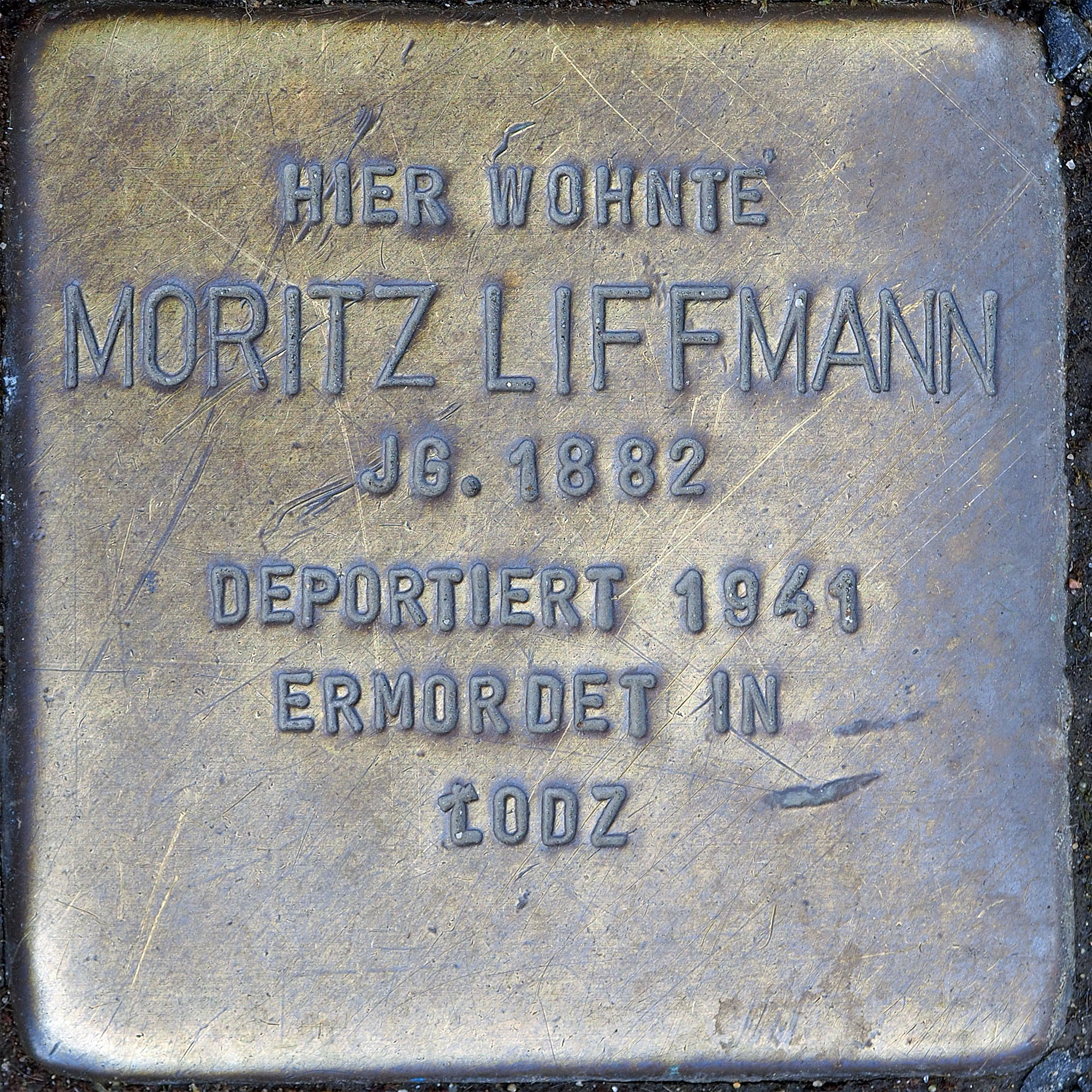 Stolpersteine MG: Liffmann, Moritz